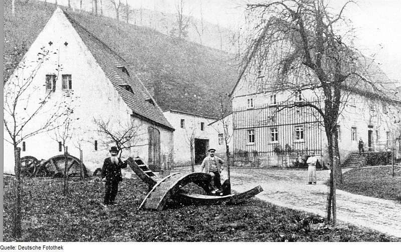 Original image description from the Deutsche Fotothek Struppen-Thürmsdorf. Rahms Mühle am Behnebach, aus: Meiche 1927